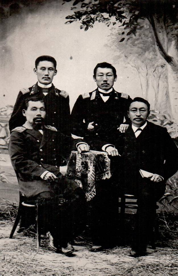 Матвій Хангалов, бурятський етнограф, з колегами